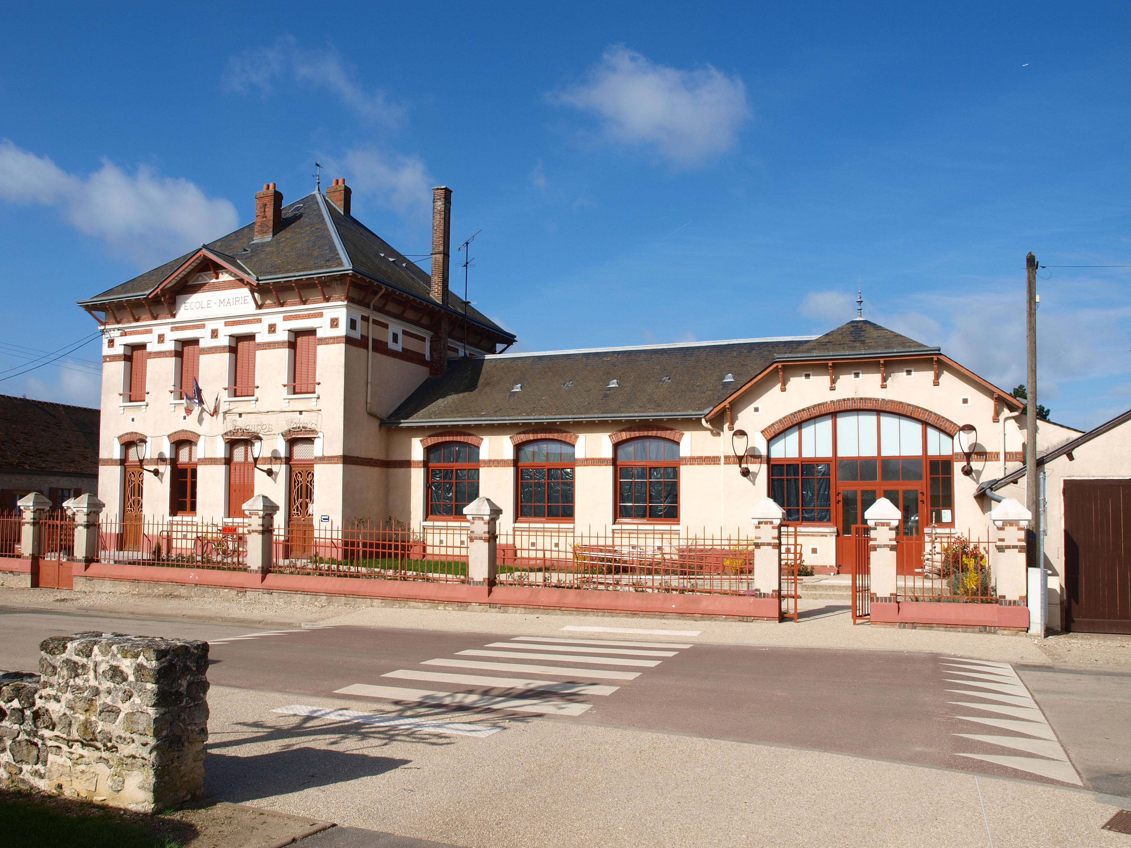 Allainville-aux-Bois (Yvelines, France) , mairie